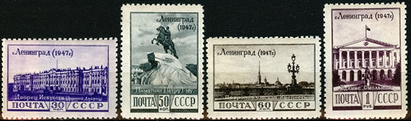 Почтовая марка